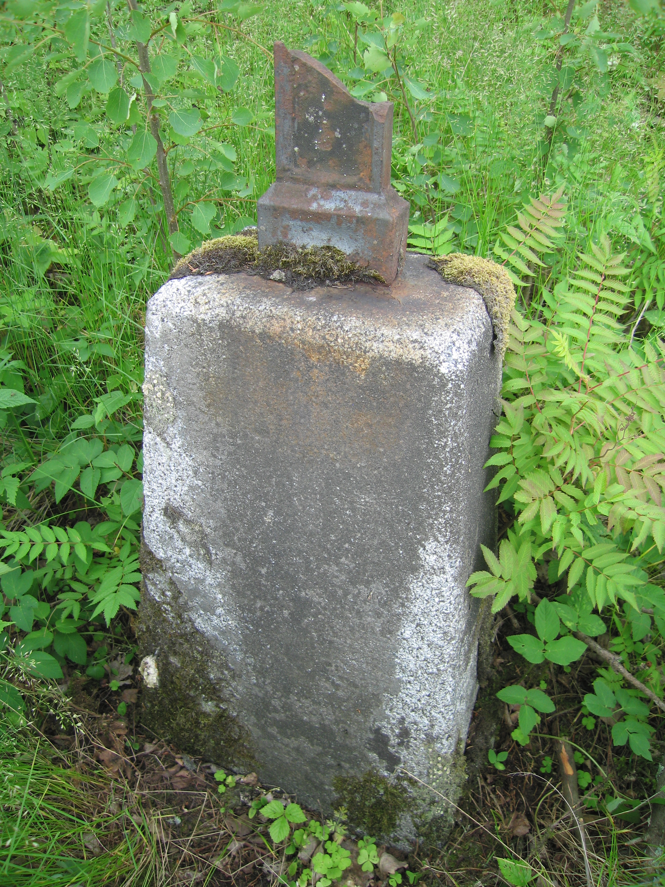 Hauatähis ristikatkega kalmistul